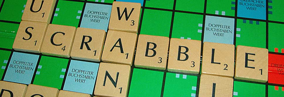 Scrabble-Schriftzug auf Scrabble-Spielfeld